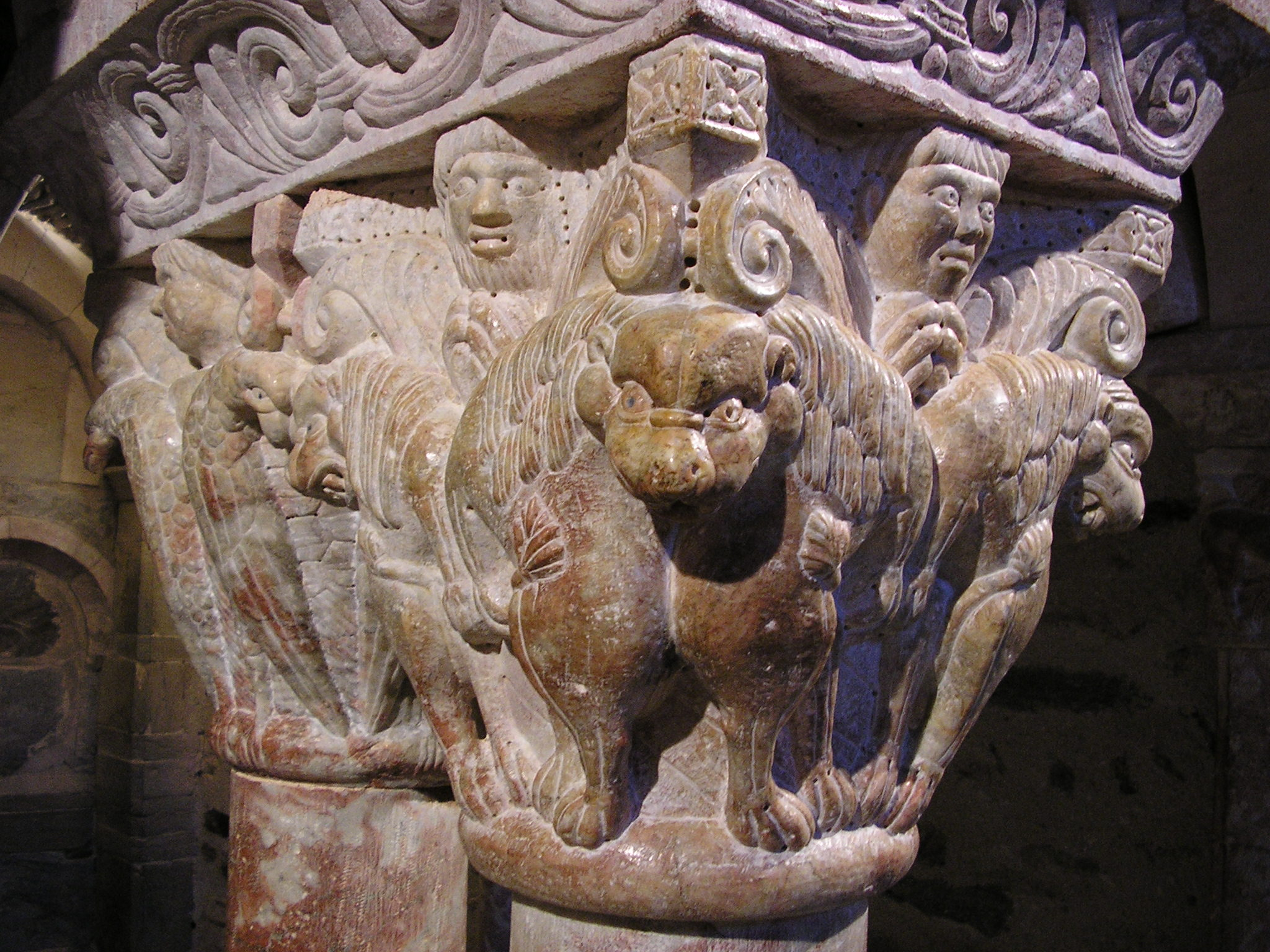 Capitell de la tribuna del Priorat de Santa Maria de Serrabona. Source: Makinal